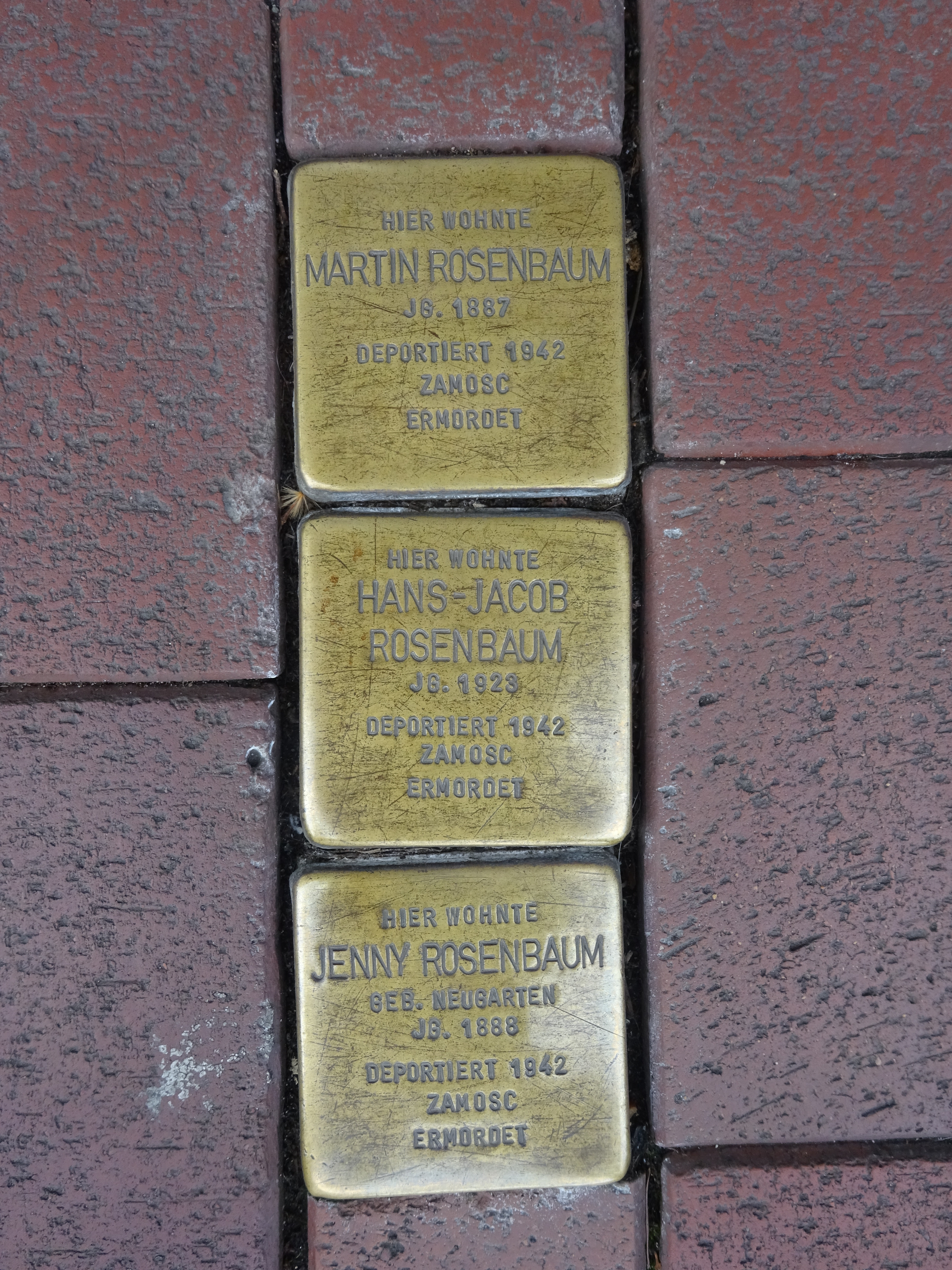 Stolpersteine Harkortstraße 71 in Dortmund